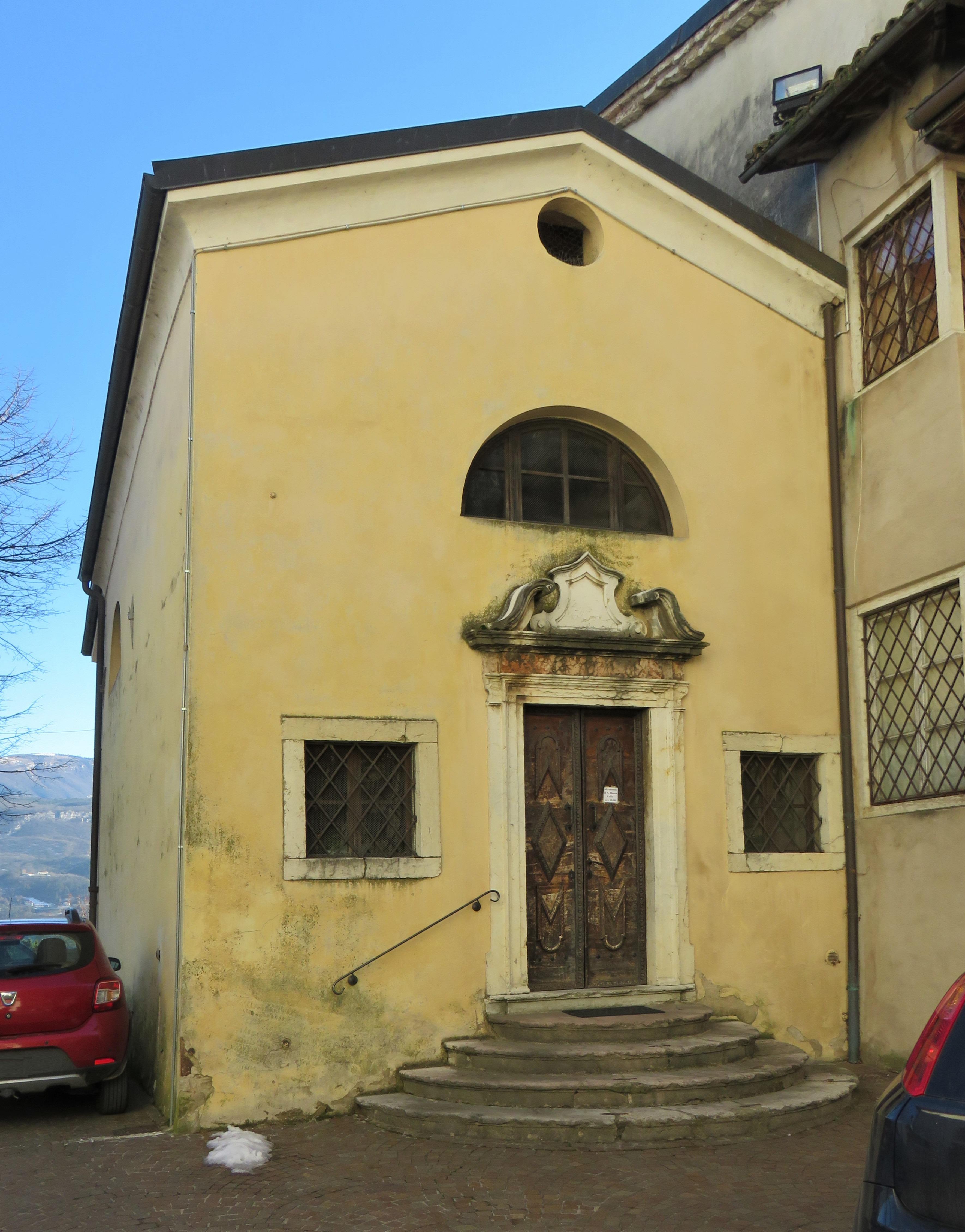 prospetto principale